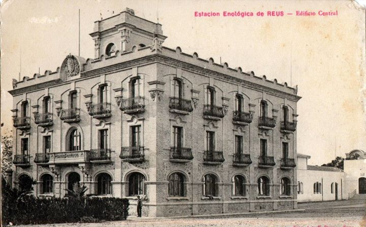 Façana de l'Estació Enològica de Reus